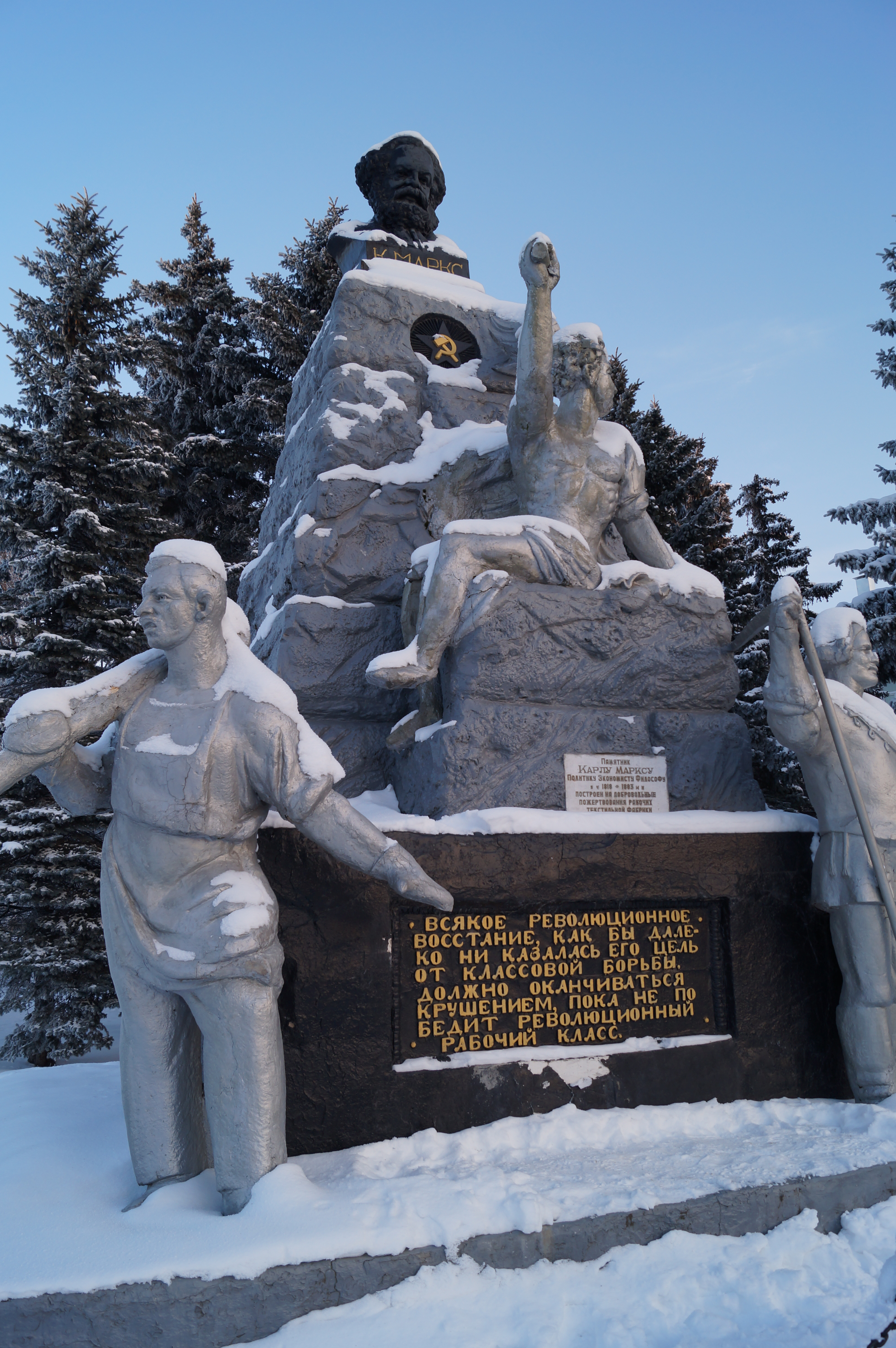 Памятник Карлу Марксу 1923 год.(Владимирская область, Собинка, Площадь)